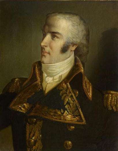 Description Caption from the museum: "Né à Paris, d’abord garde de la Marine, Magon de Médine fit la guerre d’Amérique, combattit à Ouessant, puis servit sous de Grasse. Lieutenant de vaisseau en 1786, il navigua aux Indes avant d’être arrêté comme suspect à l’île de France, durant la Révolution. Nommé capitaine de vaisseau, il se signala aux îles de Loz en 1798, puis assista Bruix au bureau des Colonies en 1799. À l’expédition de Saint-Domingue en 1801-1802, il commanda l’Océan et fut promu contre-amiral en 1803. Affecté à une division de la flottille de Boulogne, il participa ensuite à la campagne de 1805 menée par Villeneuve, et, sous les ordres de l’amiral espagnol Gravina, il fut tué à bord de l’Algésiras à Trafalgar au moment où il tentait l’abordage du Tonnant anglais, appuyé par le Pluton et le San Juan Nepomuceno. Ce tableau est une réplique réduite du portrait en pied que peignit Horace Vernet (1789-1863) en 1816, dans lequel Magon apparaît revêtu de son uniforme de contre-amiral du Consulat, défini selon le décret du 7 fructidor an VIII, devant une balustrade, avec la mer dans le fond. On peut supposer que le jeune artiste avait connu le milieu des marins grâce aux anciennes relations de son grand-père, le peintre Joseph Vernet (1715-1789), auteur des célèbres vues des ports de France que lui avait commandées Louis XV (musée de la Marine), relations sans doute entretenues aussi par son père Carle Vernet (1758-1836), également peintre. C’est donc uniquement le buste du portrait en pied de cet amiral que reproduisit Pichat, de manière certes un peu sèche, mais assez fidèle au modèle. Il en avait exposé la première version au Salon de 1846, n° 1439, à la suite de quoi il lui en fut demandé la copie pour Versailles." Jérémie Benoît.